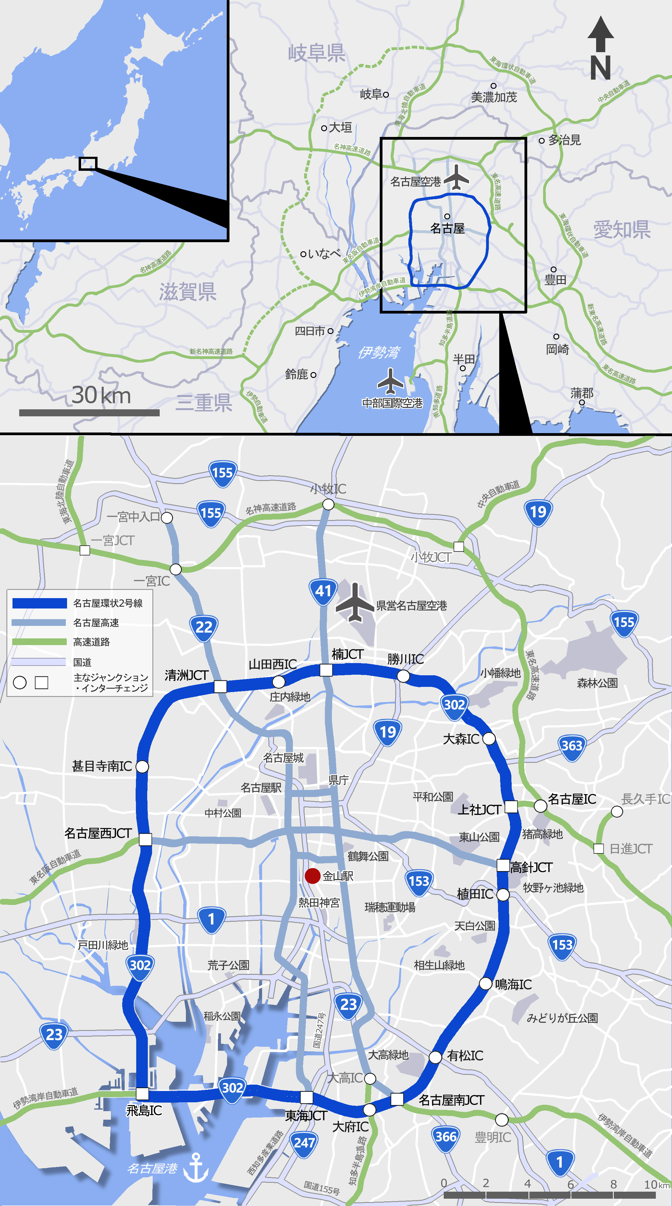 名古屋環状2号線 広域地図